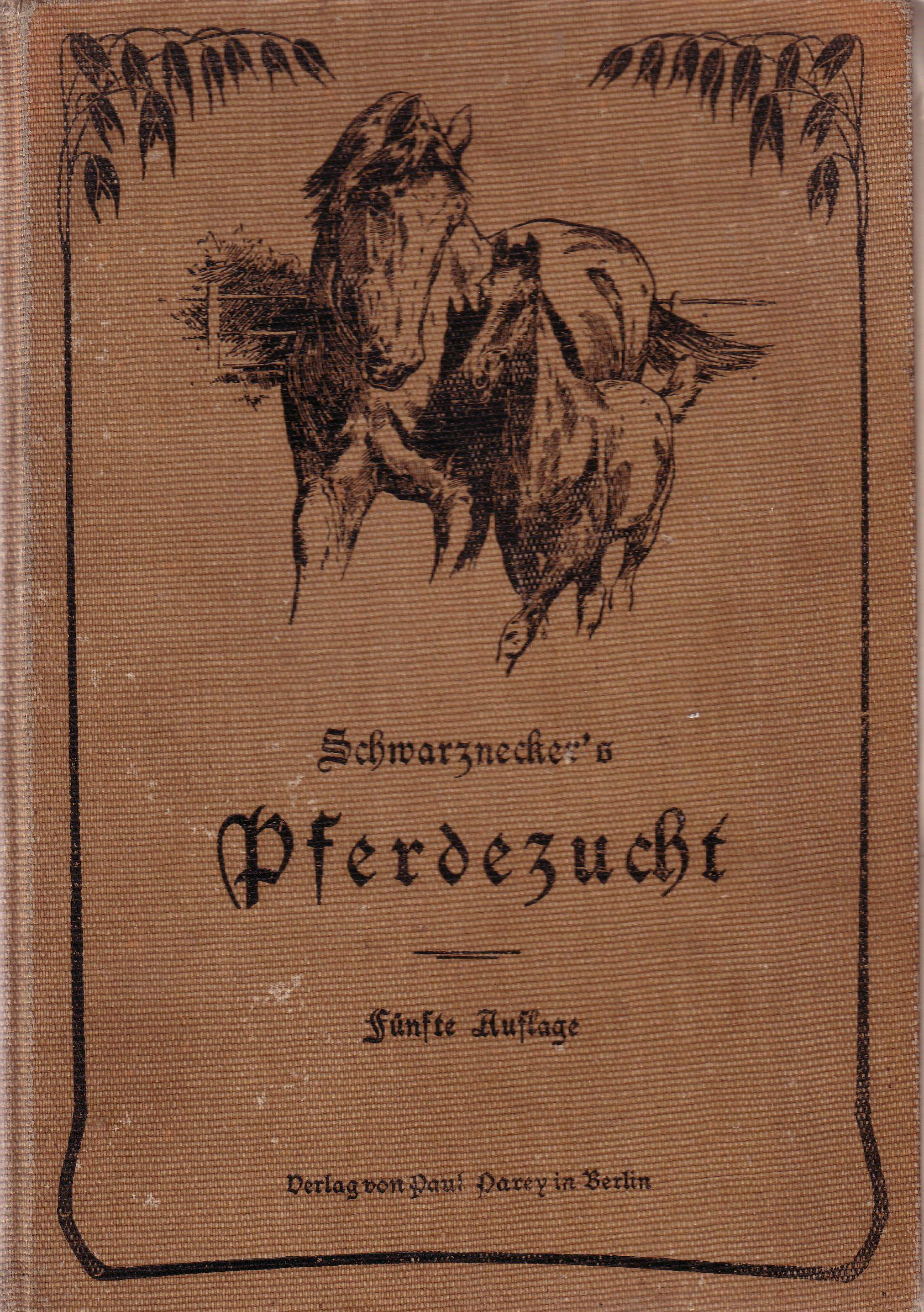 book cover, old, Schwarzeneckers Pferdebuch